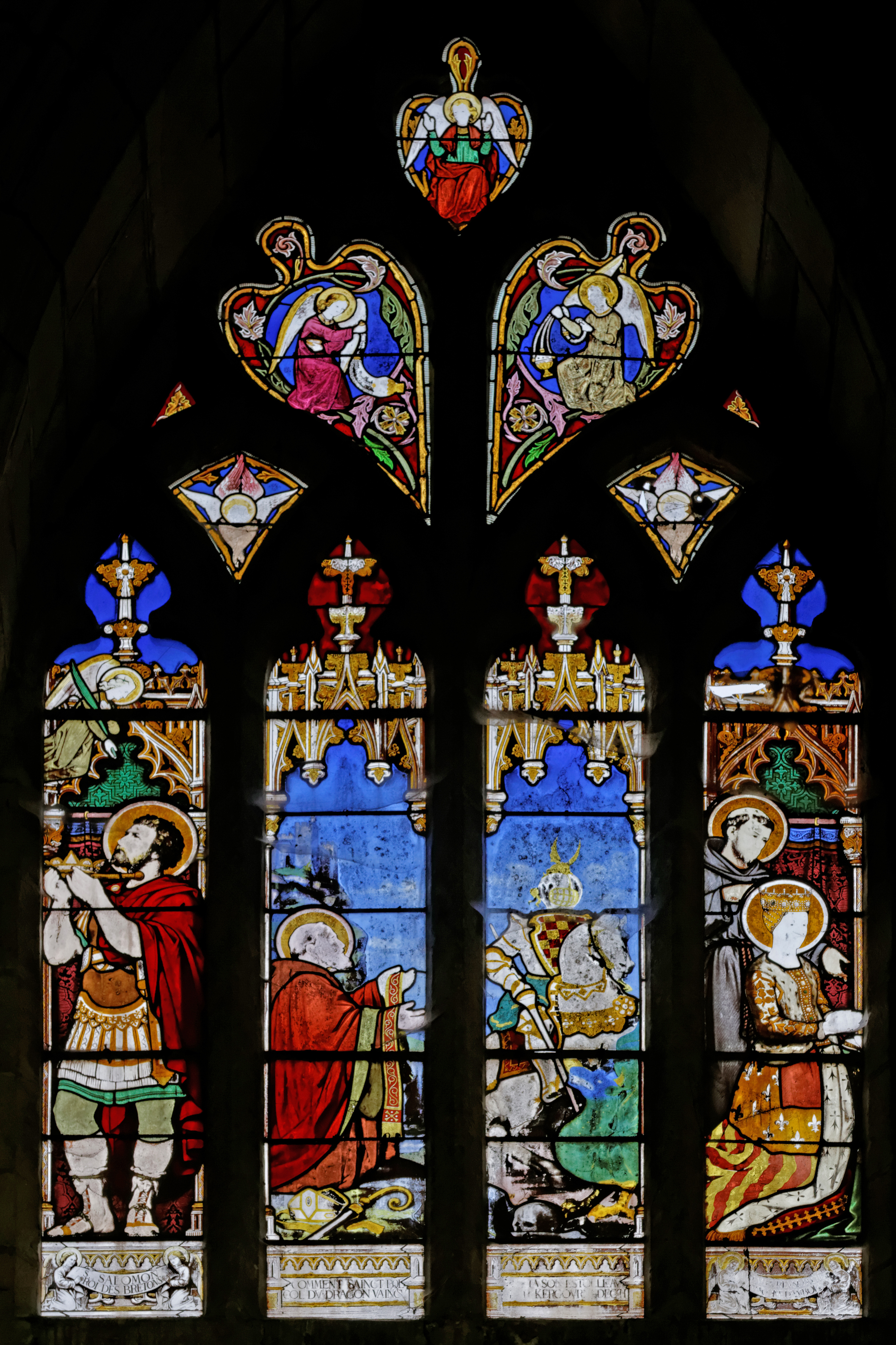 Vitrail de Lobin à gauche du chœur de la cathédrale Saint-Paul-Aurélien de Saint-Pol-de-Léon. 3 représentations : St Salomon roi des Bretons, Comment Saint-Pol passa son étole au cou du dragon vaincu par Kergommadech, la bienheureuse Françoise d'Amboise présentée par Saint-Pol-de-Léon